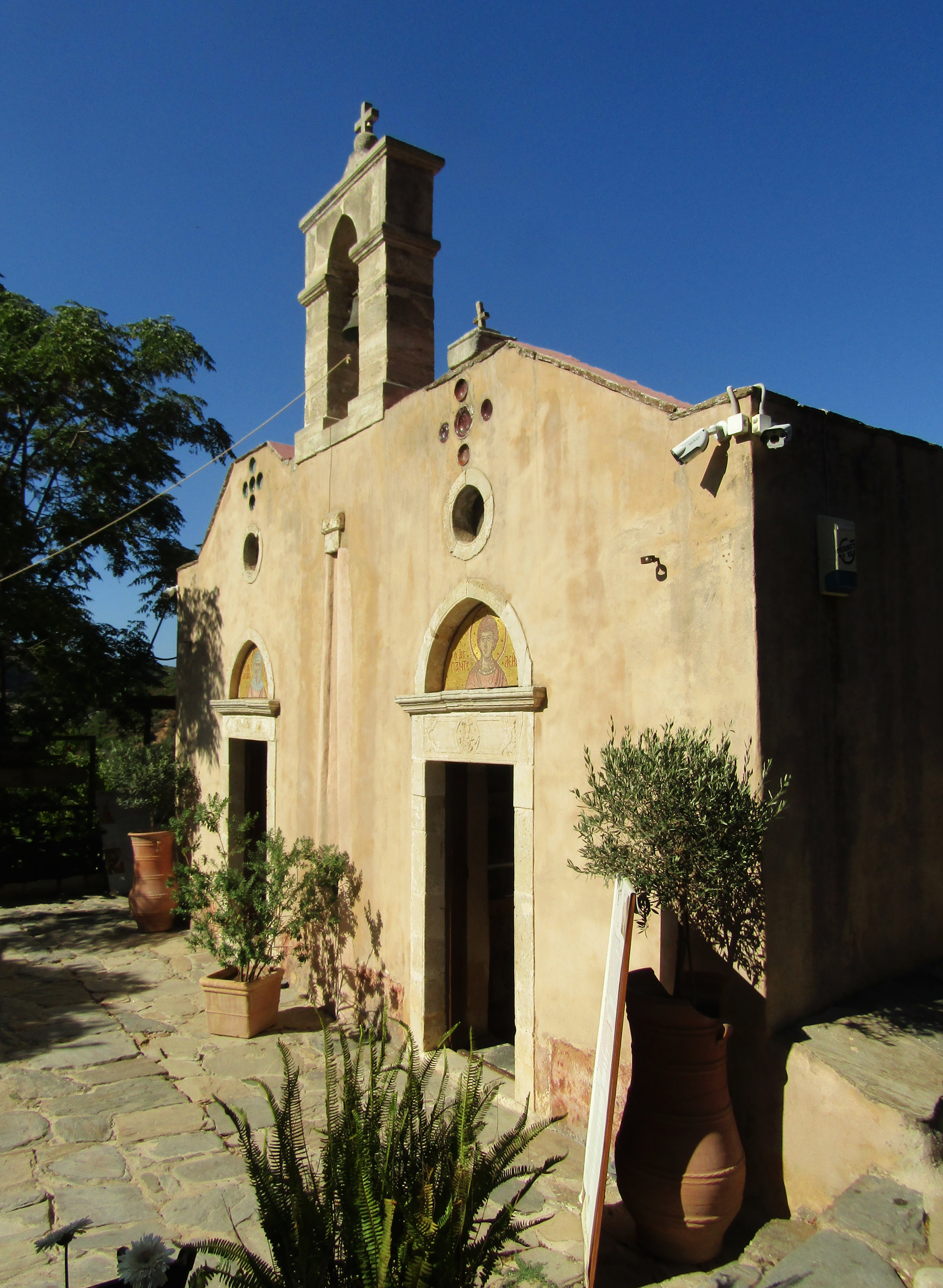 Monastero di San Panteleone (Fodele, Creta)